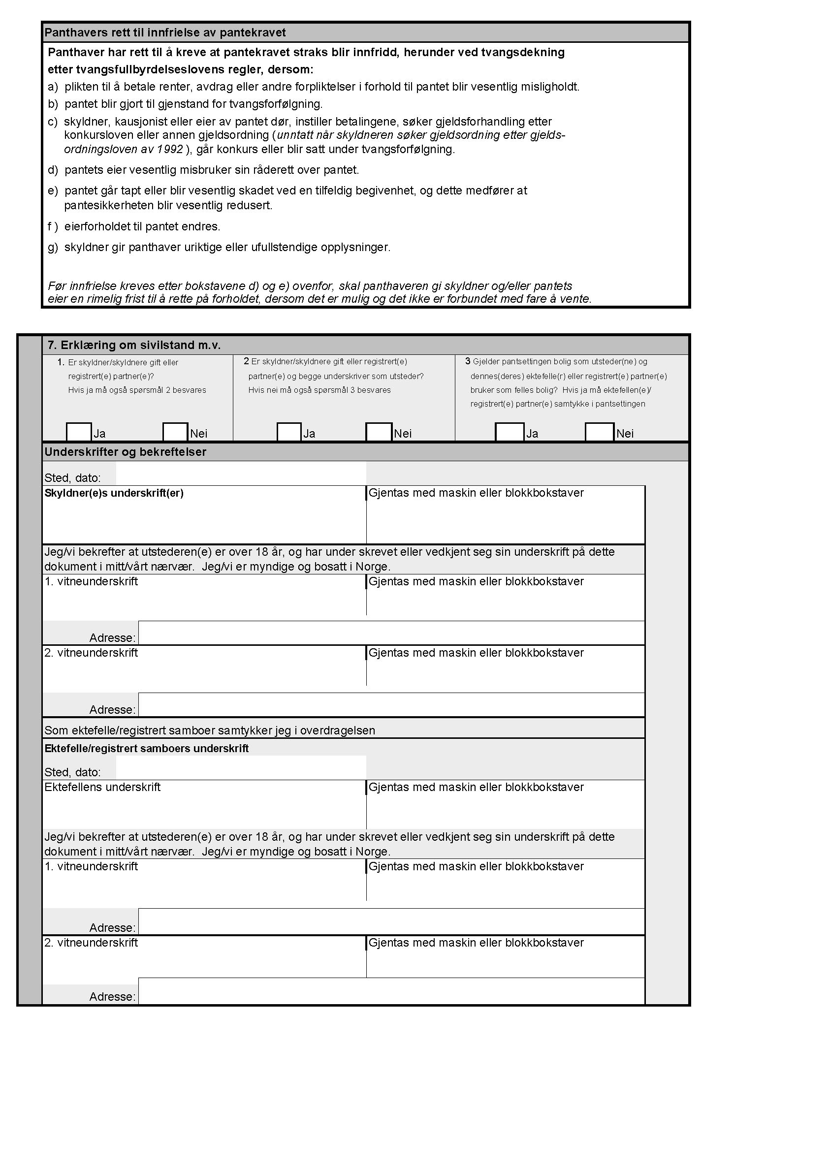 Pantedokument side 2. Norsk panterett.